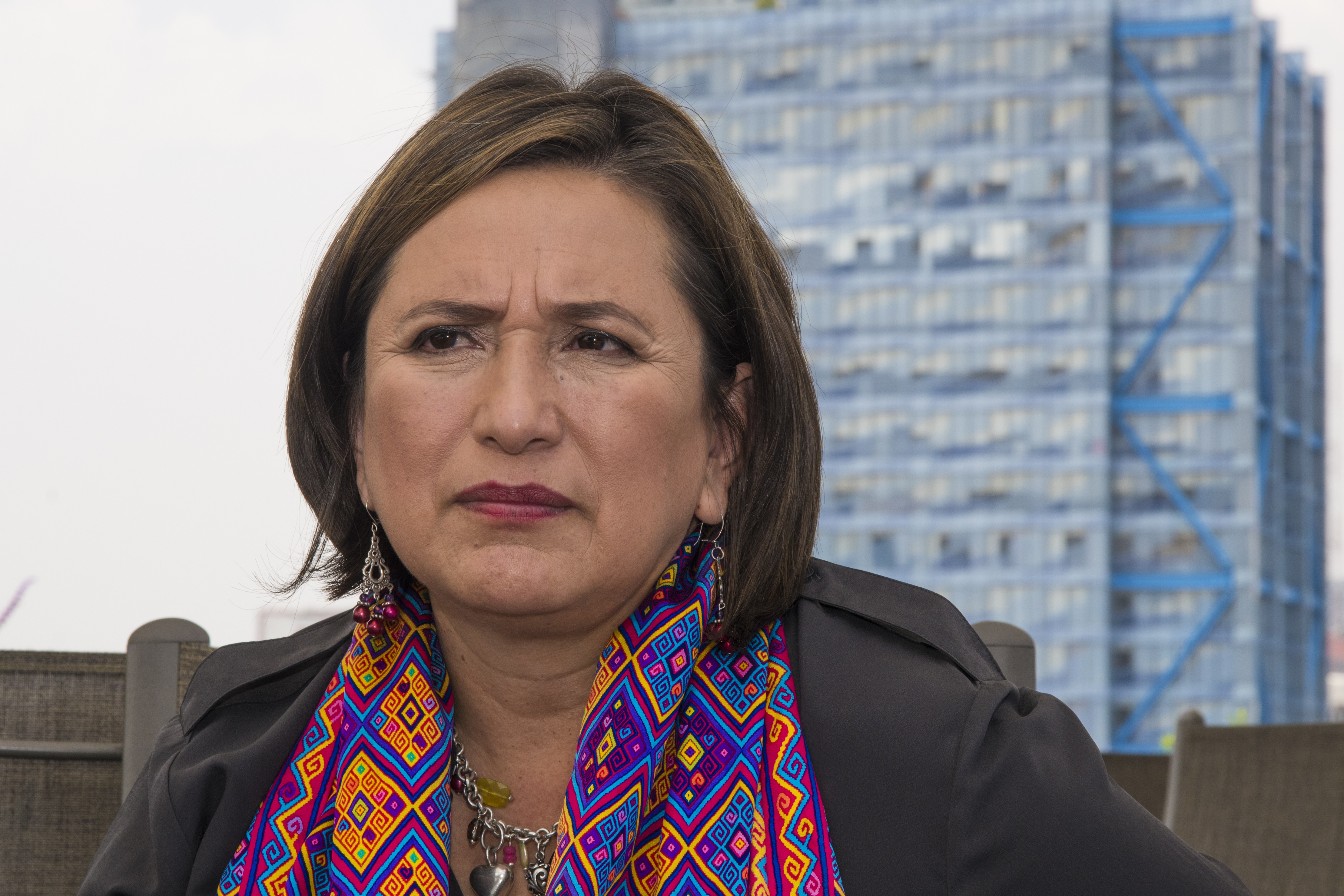 Xóchitl Gálvez es una política mexicana del PAN (Partido Acción Nacional).